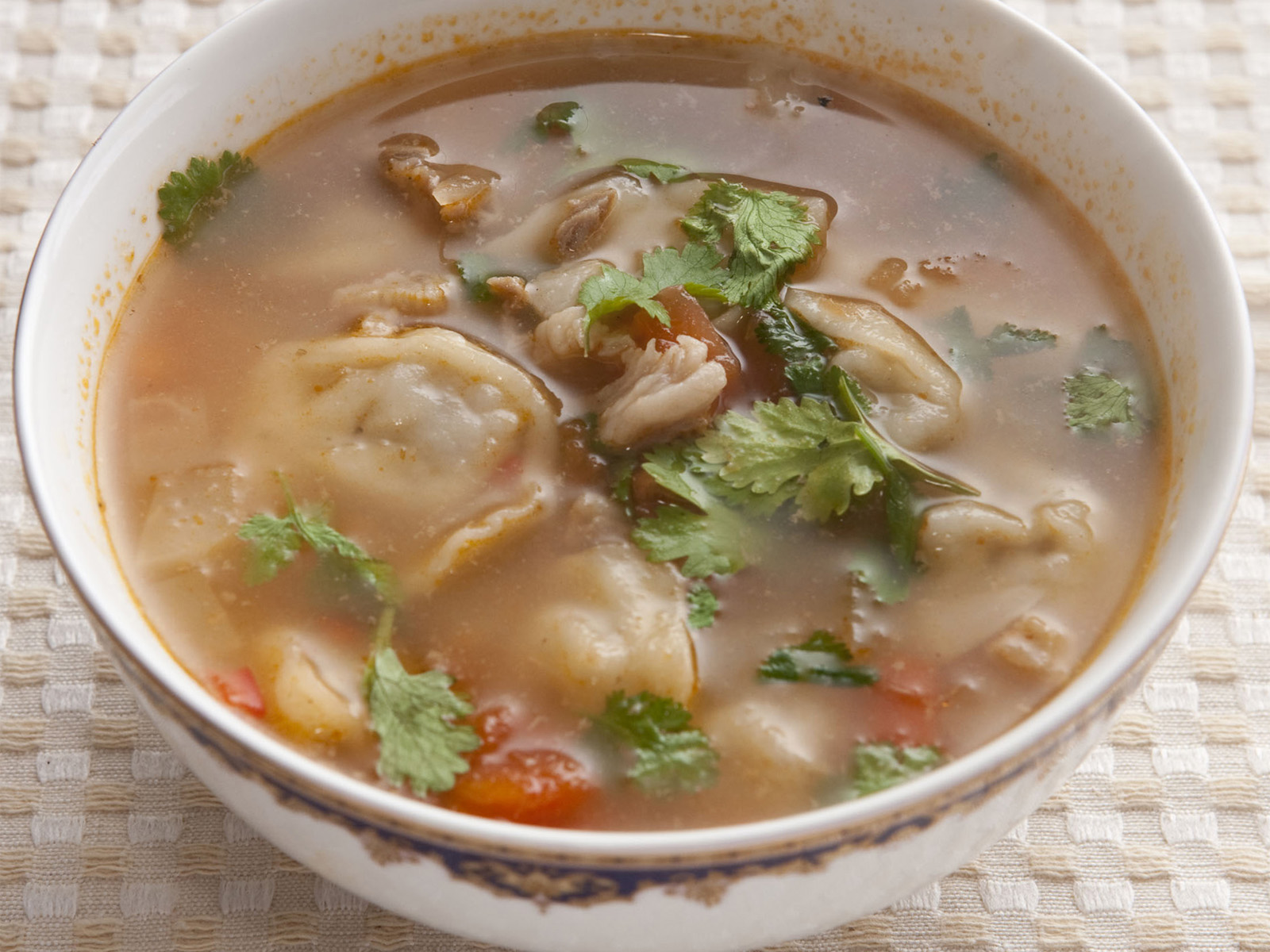 チョチュレ。シルクロード・タリム（東京）調理。